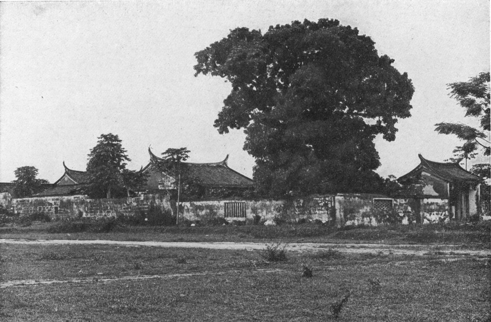 中文（台灣）: 作者：勝山吉作。屏東書院。典藏者：中央研究院數位物件典藏者：中央研究院數位文化中心。公眾領域標章（Public Domain Mark）。發佈於《開放博物館》